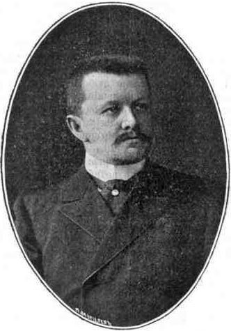 Муравьёв, Николай Валерианович